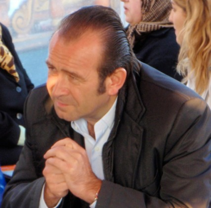 Miquel Calçada i Olivella, Catalan journalist